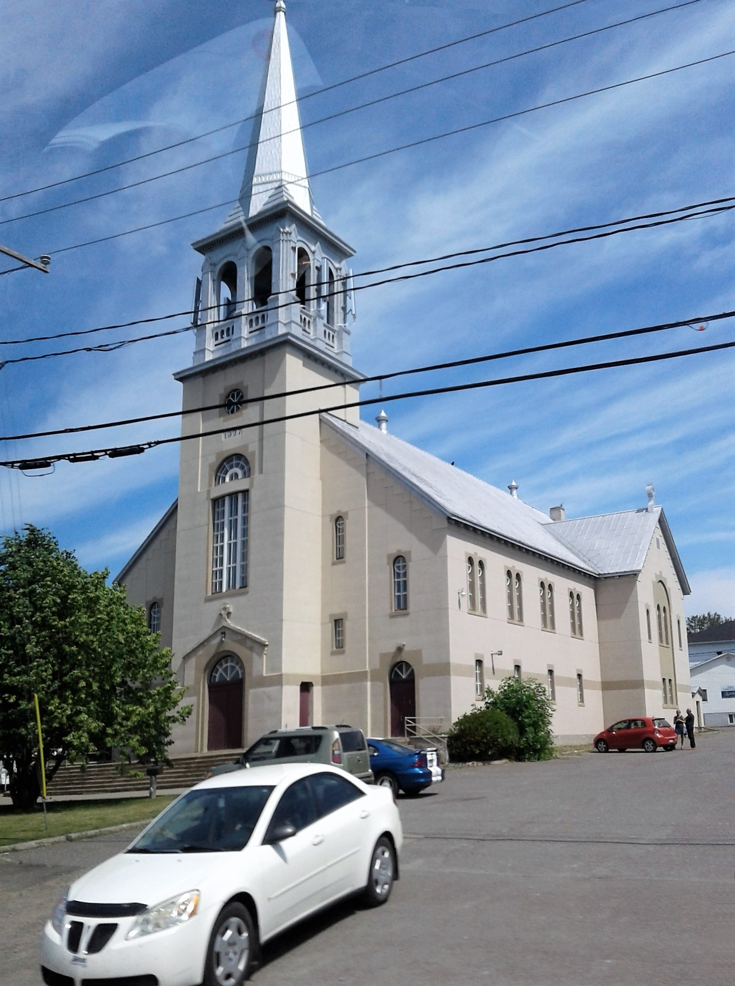 Église de Saint-Charles, rue des Sorbiers, Caplan, Québec